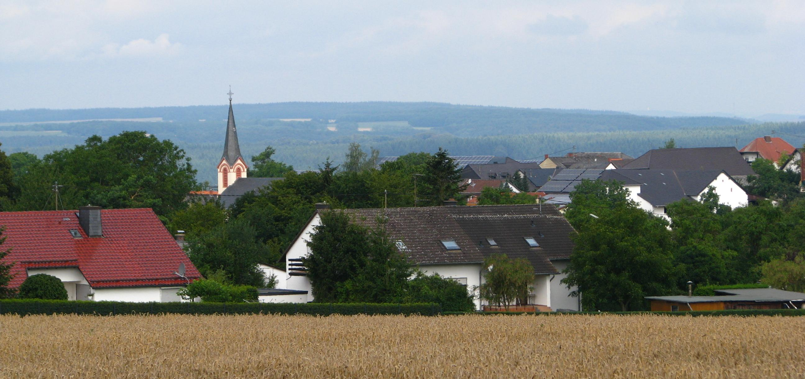 Eisenach in der Eifel von Osten aus gesehen, im Hintergrund das Ferschweiler Plateau.